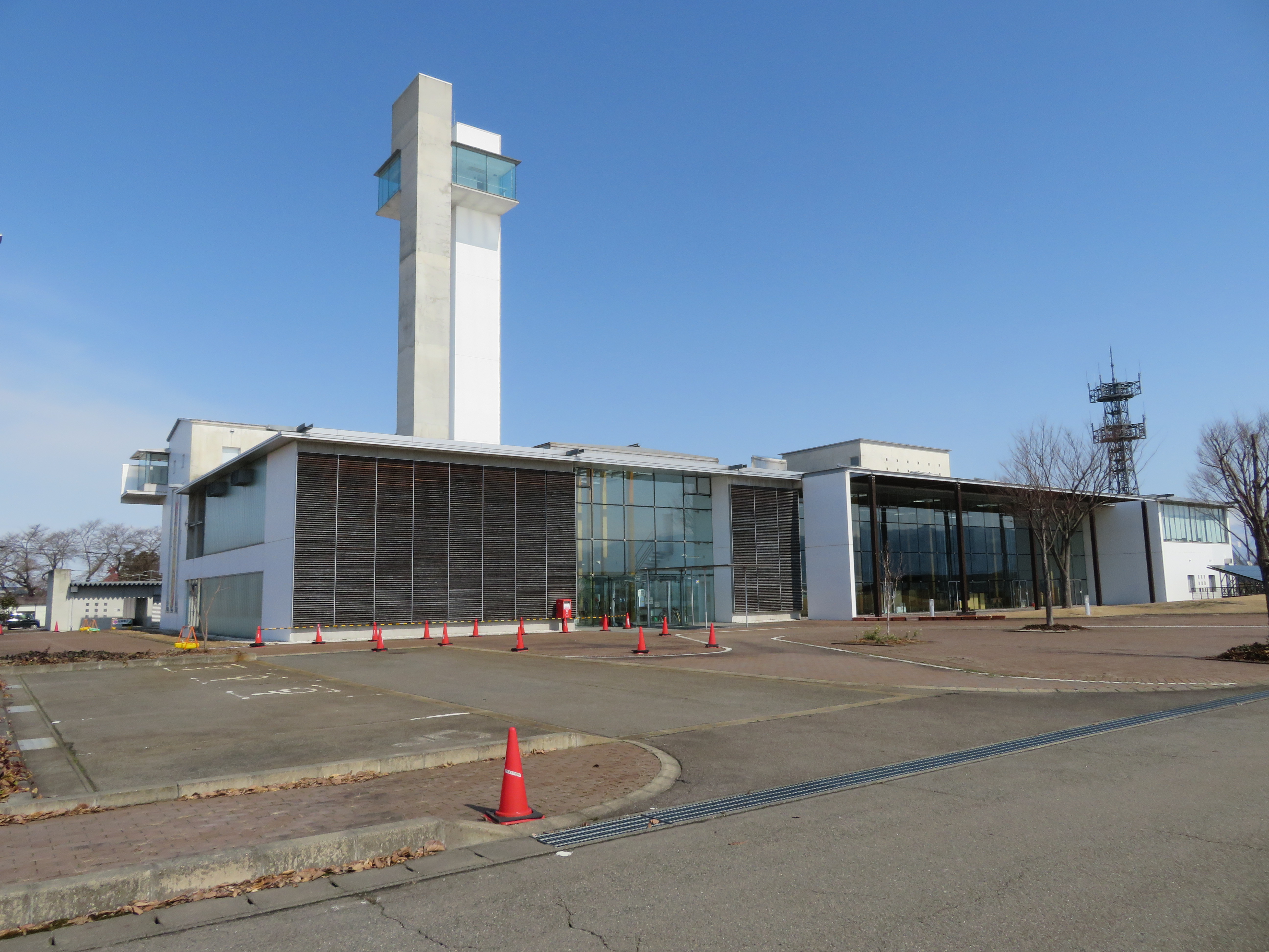 会津若松市役所北会津支所庁舎（旧 北会津村役場庁舎）